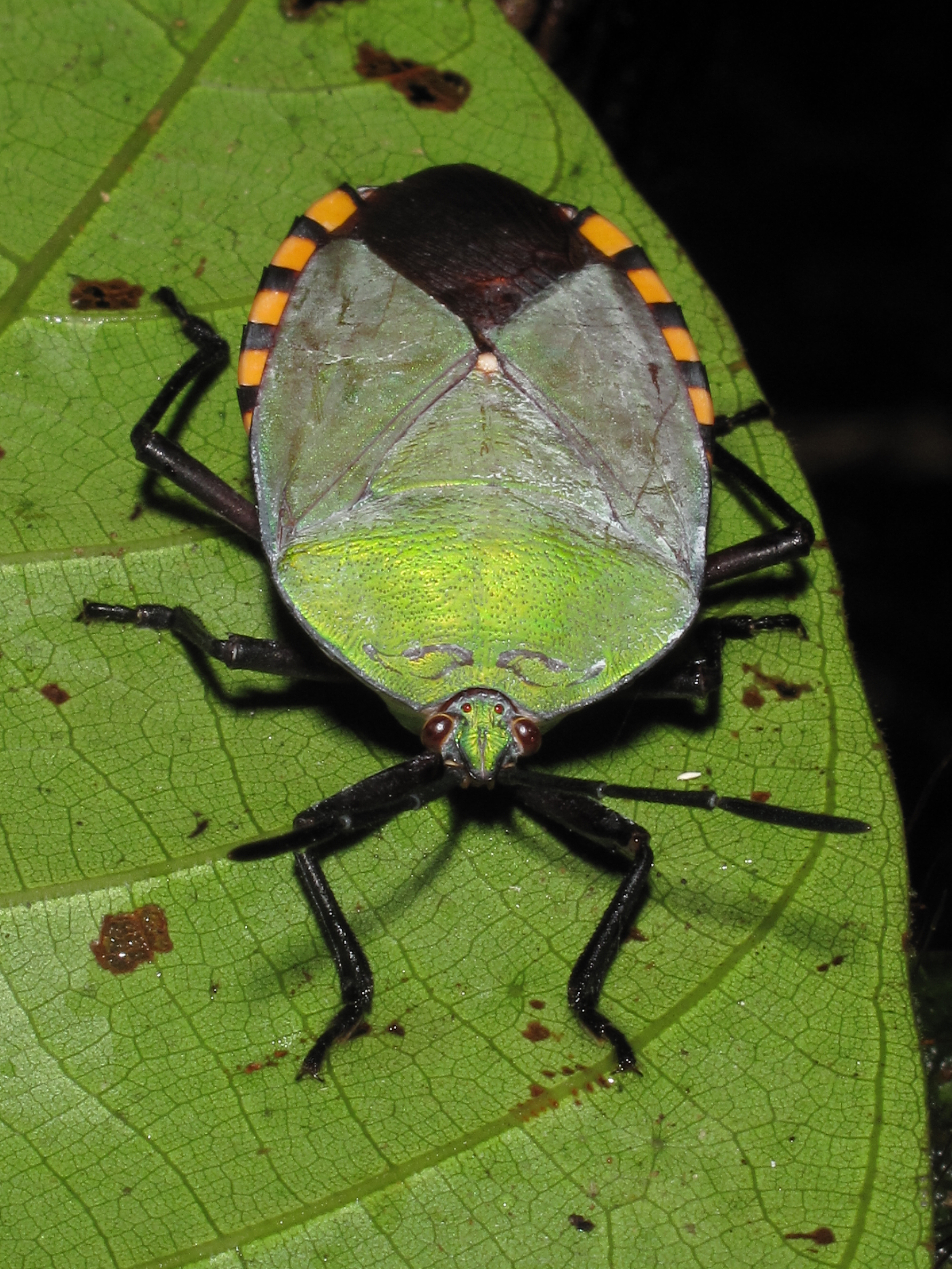 Pycanum rubens (adult), night trail, gunung mulu national park, sarawak, malaysia 2